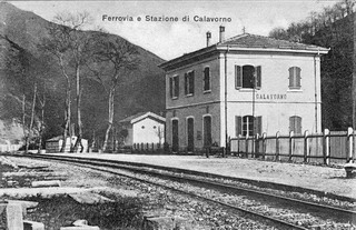 Veduta della fermata di Calavorno in una cartolina d'epoca